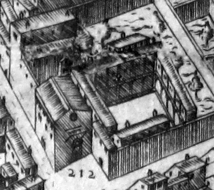 Pianta del buonsignori, dettaglio 212 san niccolò monastero (conservatorio luigi cherubini)